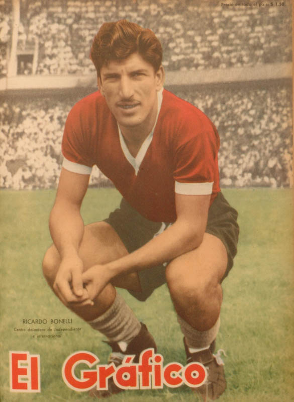 Ricardo Bonelli, jugador de Independiente, en la tapa de El Gráfico.